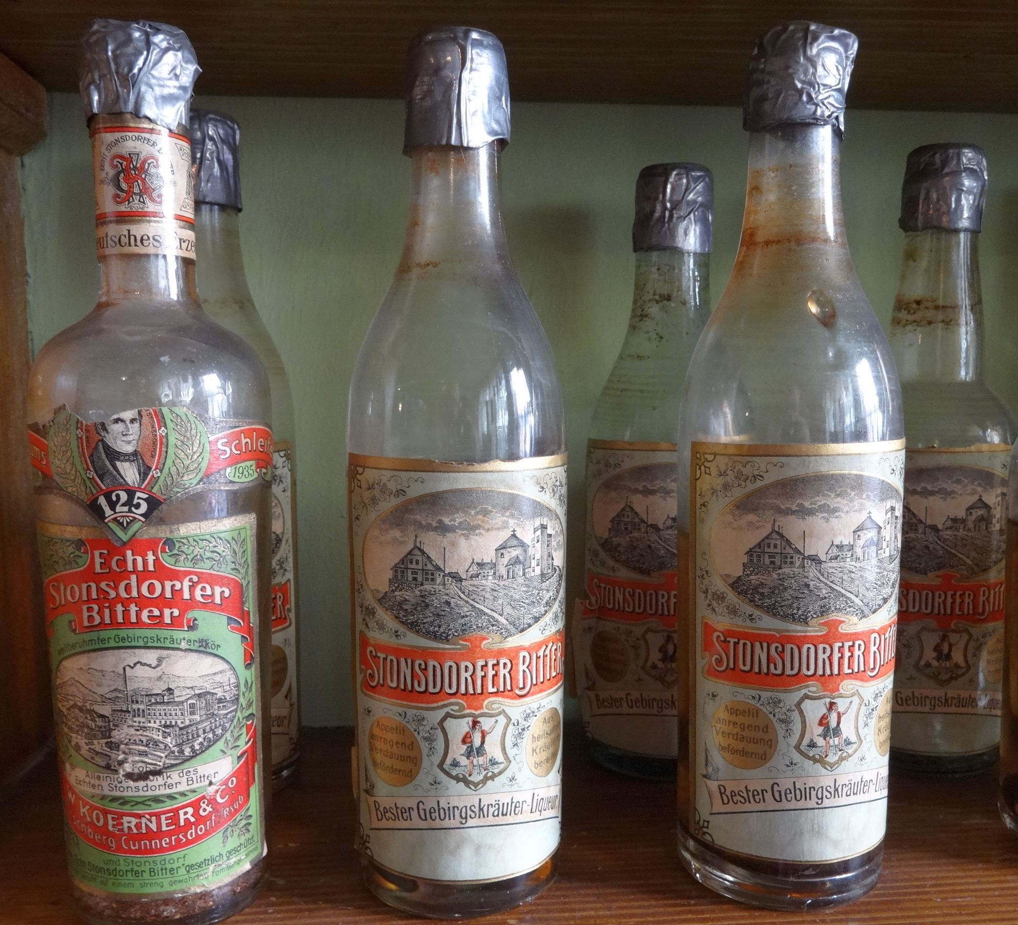 Echt Stonsdorfer Bitter im Kreismuseum Finsterwalde